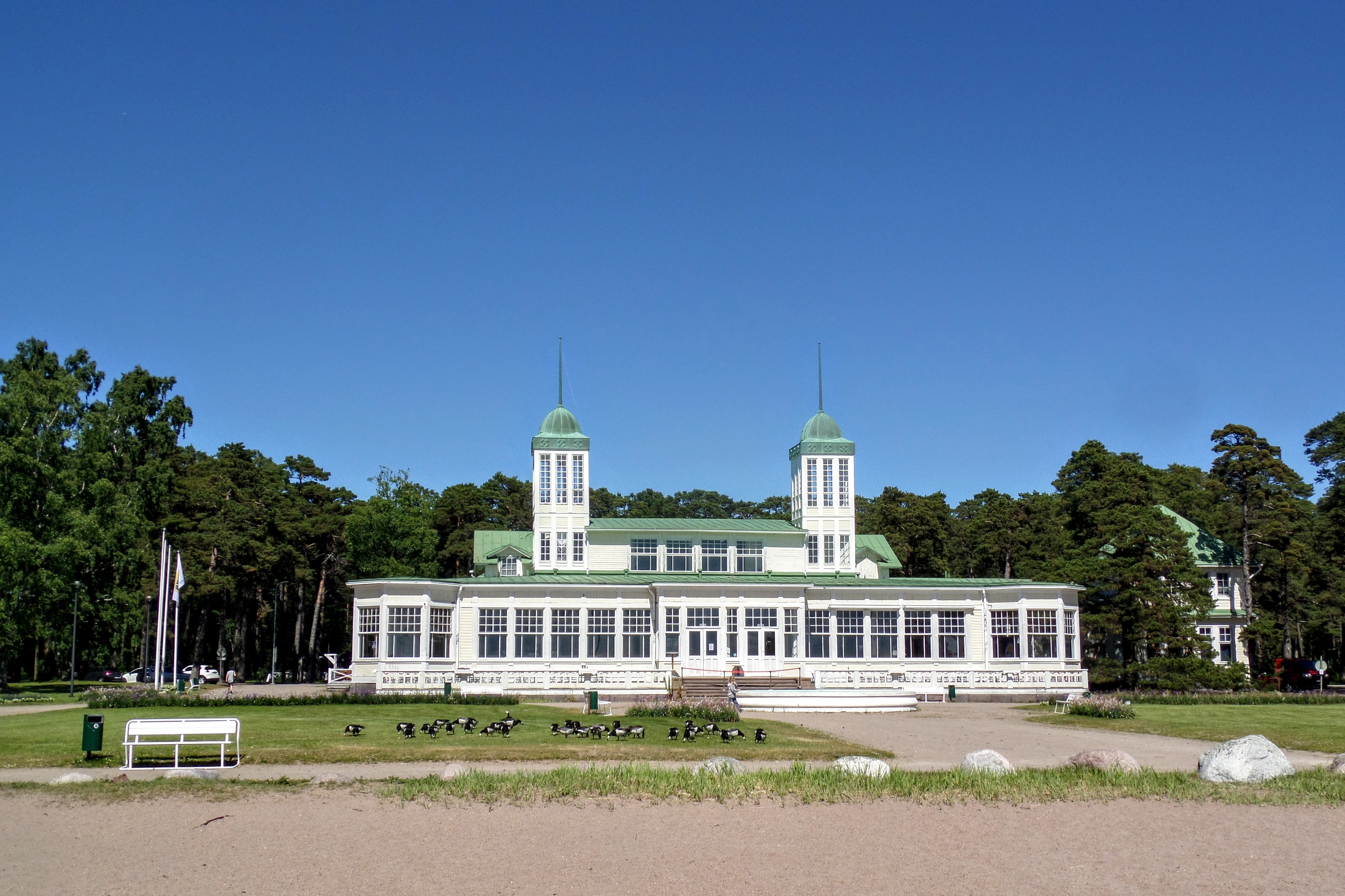 Hangon Casino